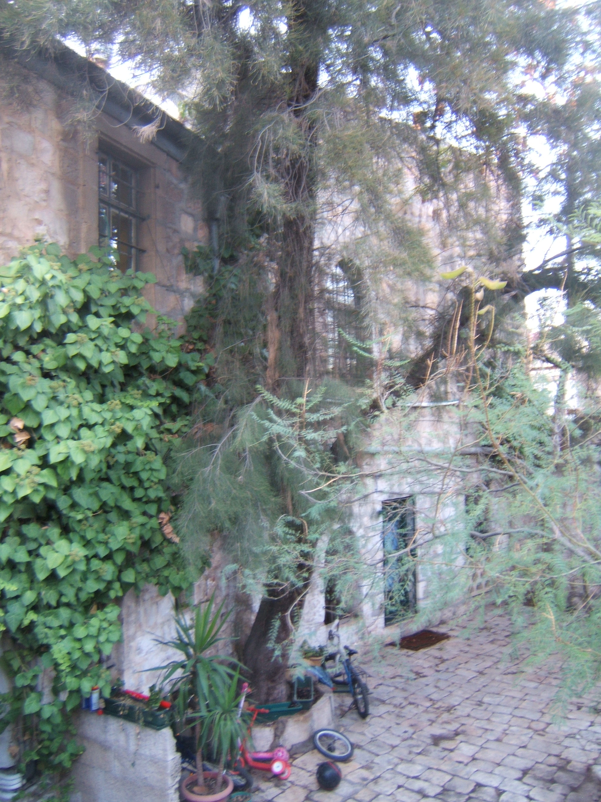 Marienstift Children Hospital, Jerusalem